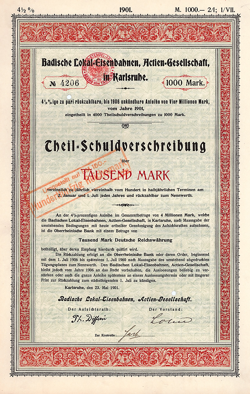 Teilschluldverschreibung über 1000 Mark der Badischen Lokalbahnen AG vom 23. Mai 1901